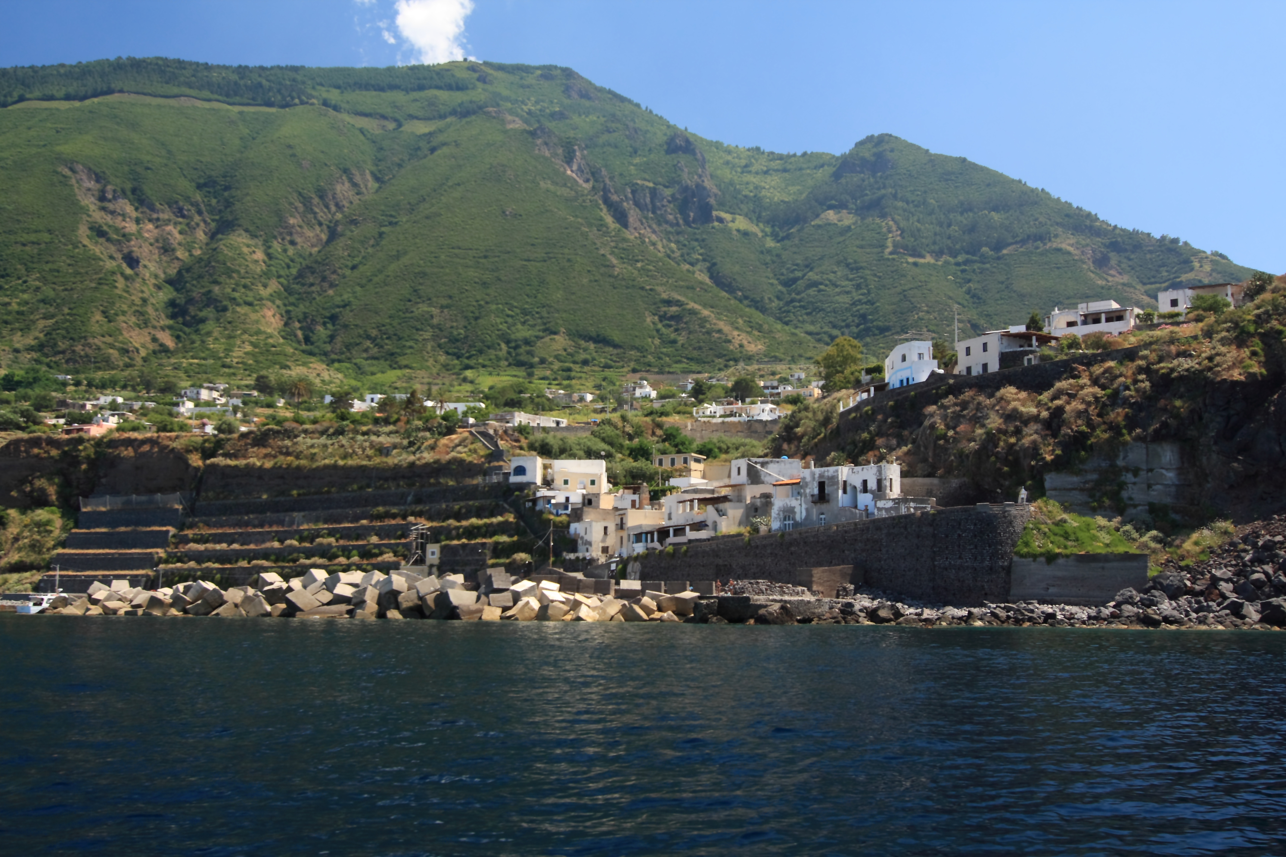 Isole Eolie, Italia